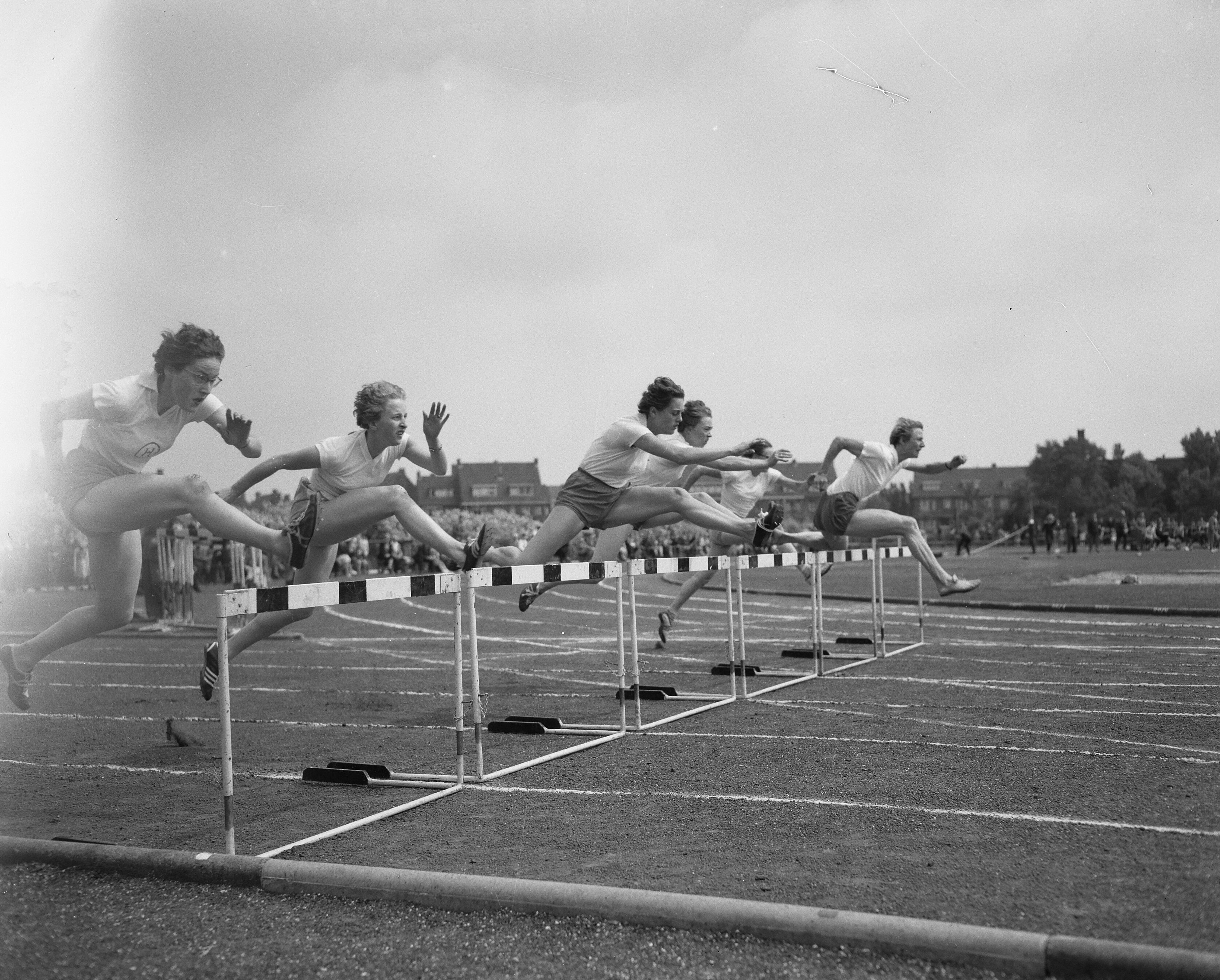 Collectie / Archief : Fotocollectie Anefo Reportage / Serie : [ onbekend ] Beschrijving : Atletiek Den Haag, 80 m horden dames met Fanny Blankers-Koen Datum : 10 juli 1954 Locatie : Den Haag, Zuid-Holland Trefwoorden : atletiek, sport Persoonsnaam : Blankers-Koen, Fanny Fotograaf : Noske, J.D. / Anefo Auteursrechthebbende : Nationaal Archief Materiaalsoort : Negatief (zwart/wit) Nummer archiefinventaris : bekijk toegang 2.24.01.04 Bestanddeelnummer : 906-5881